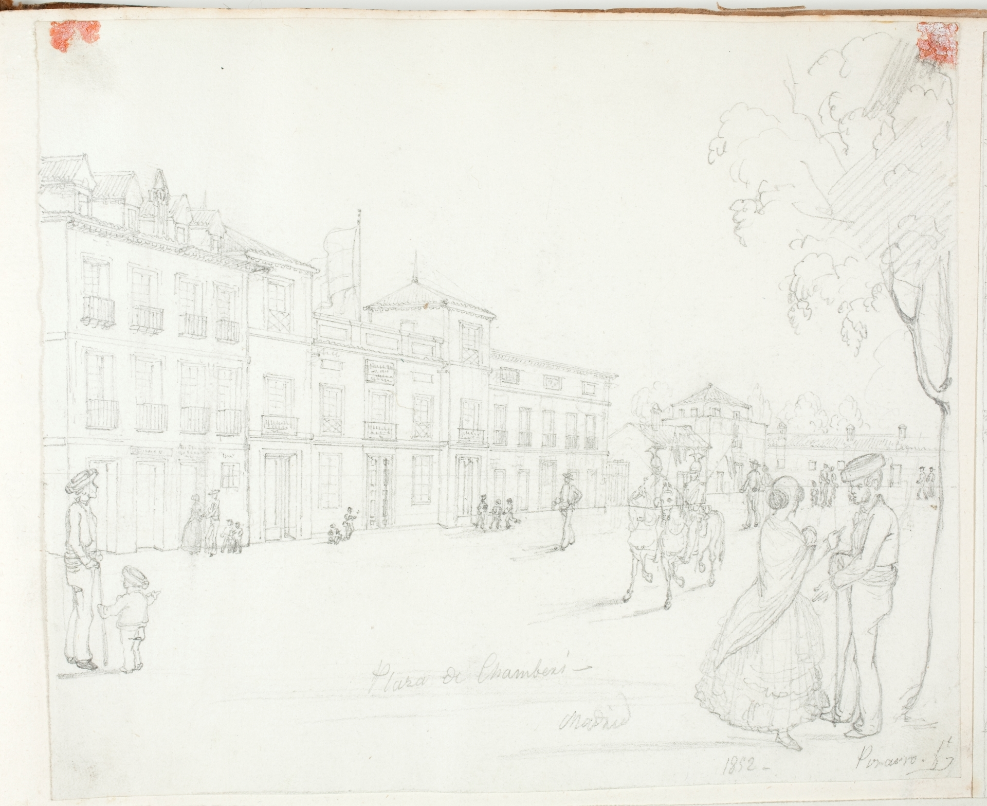 Vista de la plaza de Chamberí en Madrid (1840-1873). Lápiz compuesto sobre papel avitelado. Museo del Prado, Madrid, España